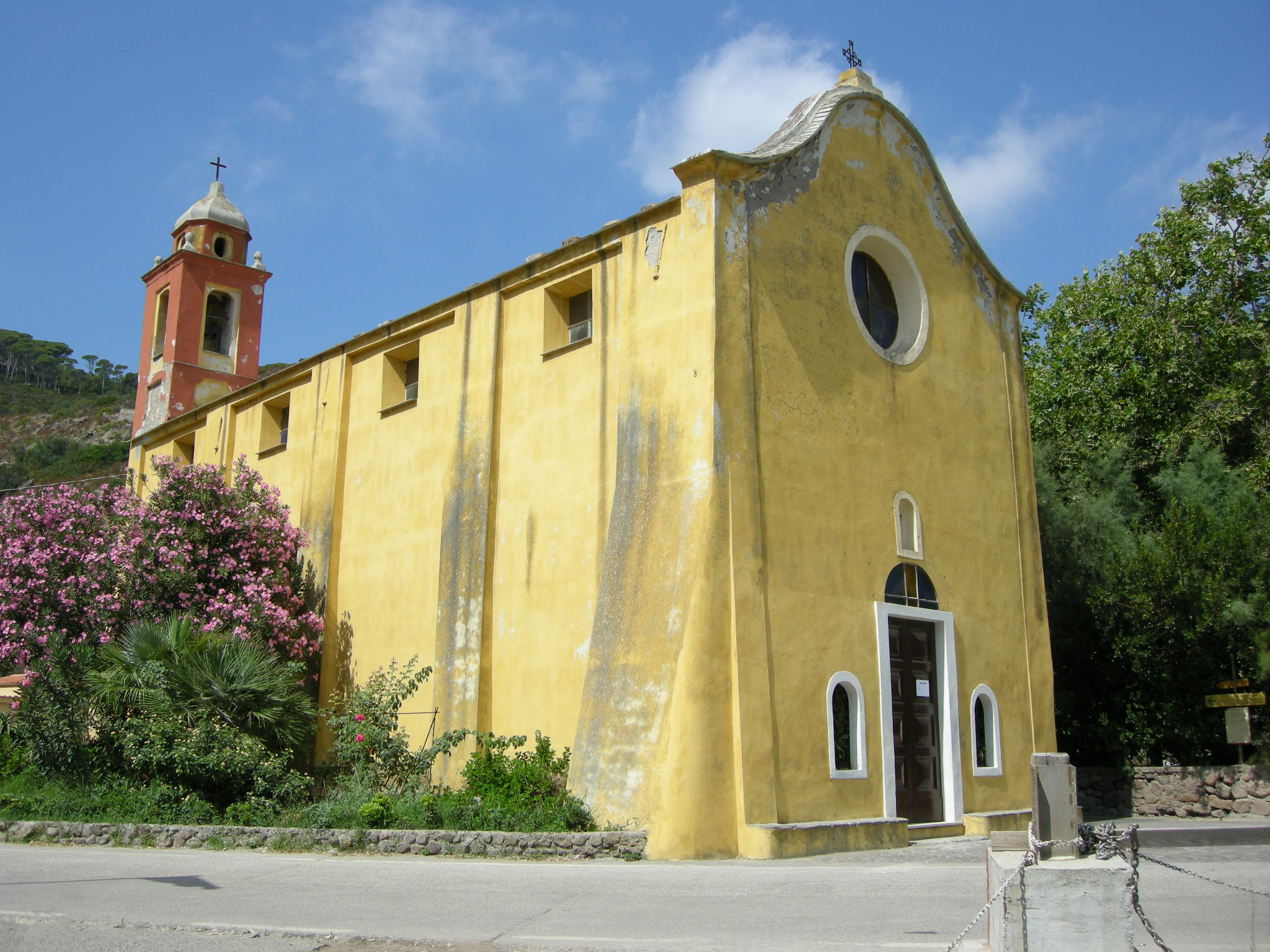 Santa Maria Assunta (Capraia Isola)